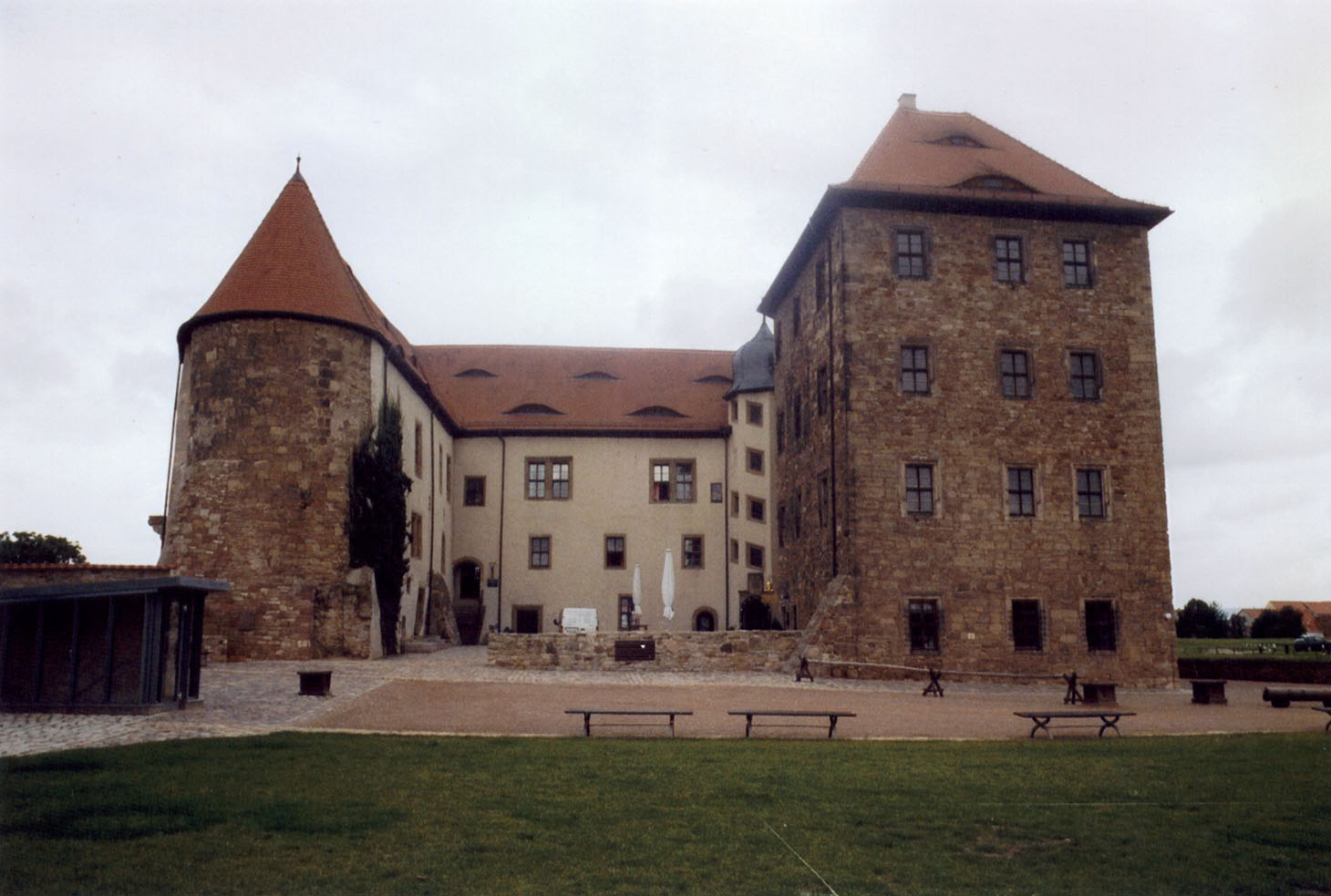 Burg Heldrungen, Renaissanceschloss mit eingebautem Bergfried, selbst fotografiert, MacElch (Rainer Kunze), 2005